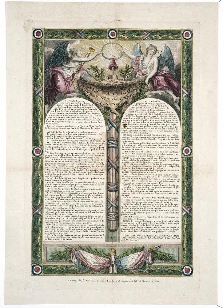 Déclaration des droits de l'homme et du citoyen, en trente-cinq articles, datée du 10 août 1793. Les signataires du texte sont Collot d'Herbois, Durand de Maillane, Ducos, Meaulle, Delacroix, Gossuin et Laloy. Le cadre entourant le texte est formé de feuilles de chêne et de faisceaux de licteurs. Il est surmonté d'un cartouche avec deux génies couronnant le symbole de l'Être suprême et tenant une peau d'ours, au-dessous de laquelle se trouve un trophée composé de feuilles de chêne, d'une hache, d'une massue et d'un faisceau de licteur coiffé d'un bonnet phrygien. Au-dessous du texte, un autre trophée composé de palmes, de fers brisés et de drapeaux. Imagerie sur cuivre coloriée, publiée "à Paris, chez les citoyens Esnauts et Rapilly, rue Saint-Jacques, à la Ville de Coutances, n° 259".